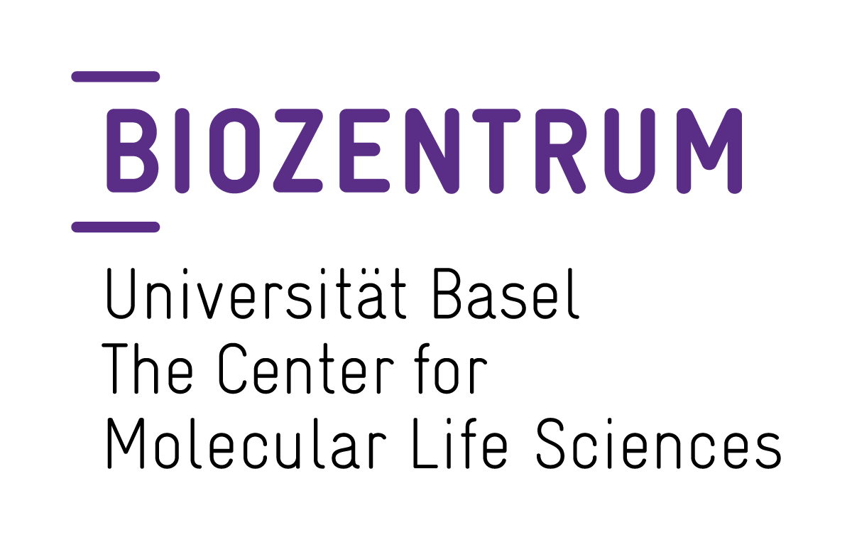 Logo des Biozentrum Universität Basel